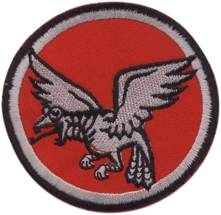 Squadron 118 (Israeli Air Force)